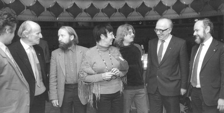 Berlin, Komponisten-Kongress ADN-ZB / Zimmermann / 18.02.82 / pe / Berlin: Delegierten-Konferenz des Verbands der Komponisten und Musikwissenschaftler der DDR. Zu den prominenten Teilnehmern an den zweitätigen Beratungen in der Kongreßhalle gehören Horst Sindermann (2. v.r.), Mitglied des Politbüros des ZK der SED, die Komponisten Siegfried Matthus, Prof. em. Dr. Dr. h.c. Ernst Hermann Meyer, Präsident des Verbandes, Georg Katzer, Ruth Zechlin, Reinhard Lakomy (vlnr) und Dr. Peter Spahn (r.), 1. Sekretär des Verbandes. Abgebildete Personen: Katzer, Georg: Vizepräsident Verband Komponisten- und Musikwissenschaftler, DDR (GND 119075091) Lakomy, Reinhard: Sänger, Komponist, DDR (GND 121996468) Matthus, Siegfried: Komponist, DDR (GND 118579053) Meyer, Ernst Hermann Prof.h.c.: Komponist, Verband Deutscher Komponisten und Musikwissenschaftler, DDR (GND 118581813) Sindermann, Horst: Volkskammerpräsident, stellvertretender Staatsratsvorsitzender, DDR (GND 12996218X) Spahn, Peter Dr.: 1. Sekretär Verband der Komponisten und Musikwissenschaftler, DDR Zechlin, Ruth: Komponistin, Cembalistin, Dozentin an der Hochschule für Musik, DDR (GND 118830511